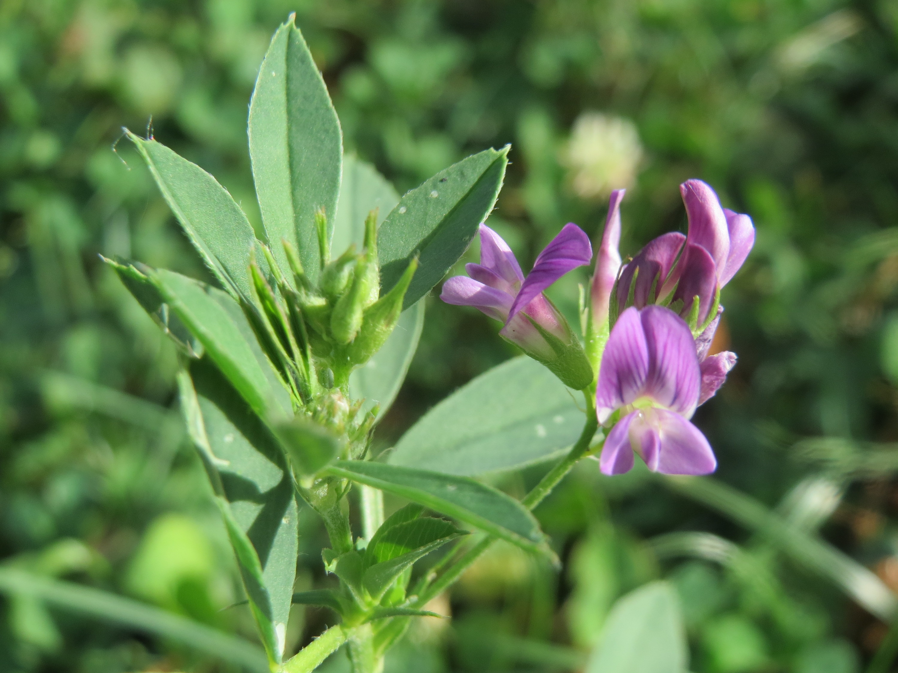 Bastard-Luzerne (Medicago × varia) an einer Ruderalstelle in der Berlinallee in Hockenheim